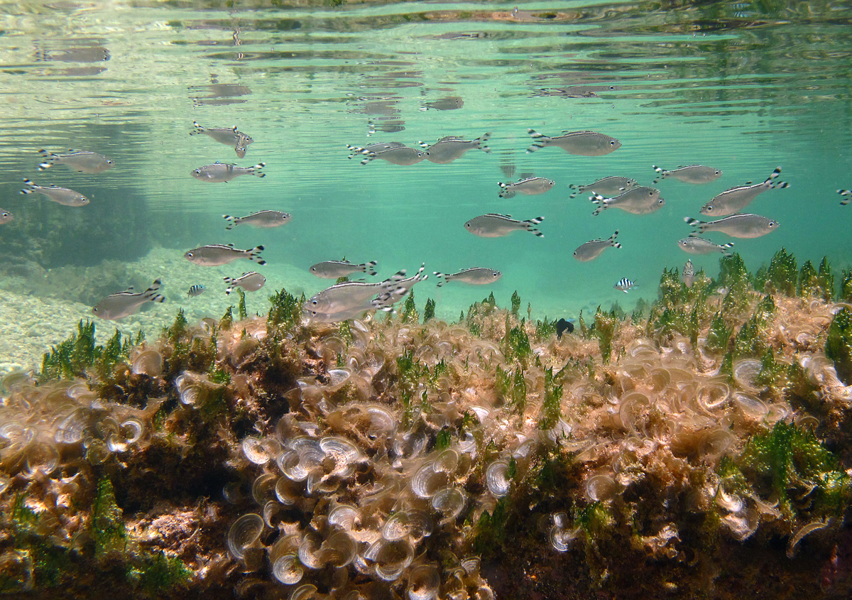 Un banc de poissons pavillons rayés (Kuhlia mugil) juvéniles à la Réunion.